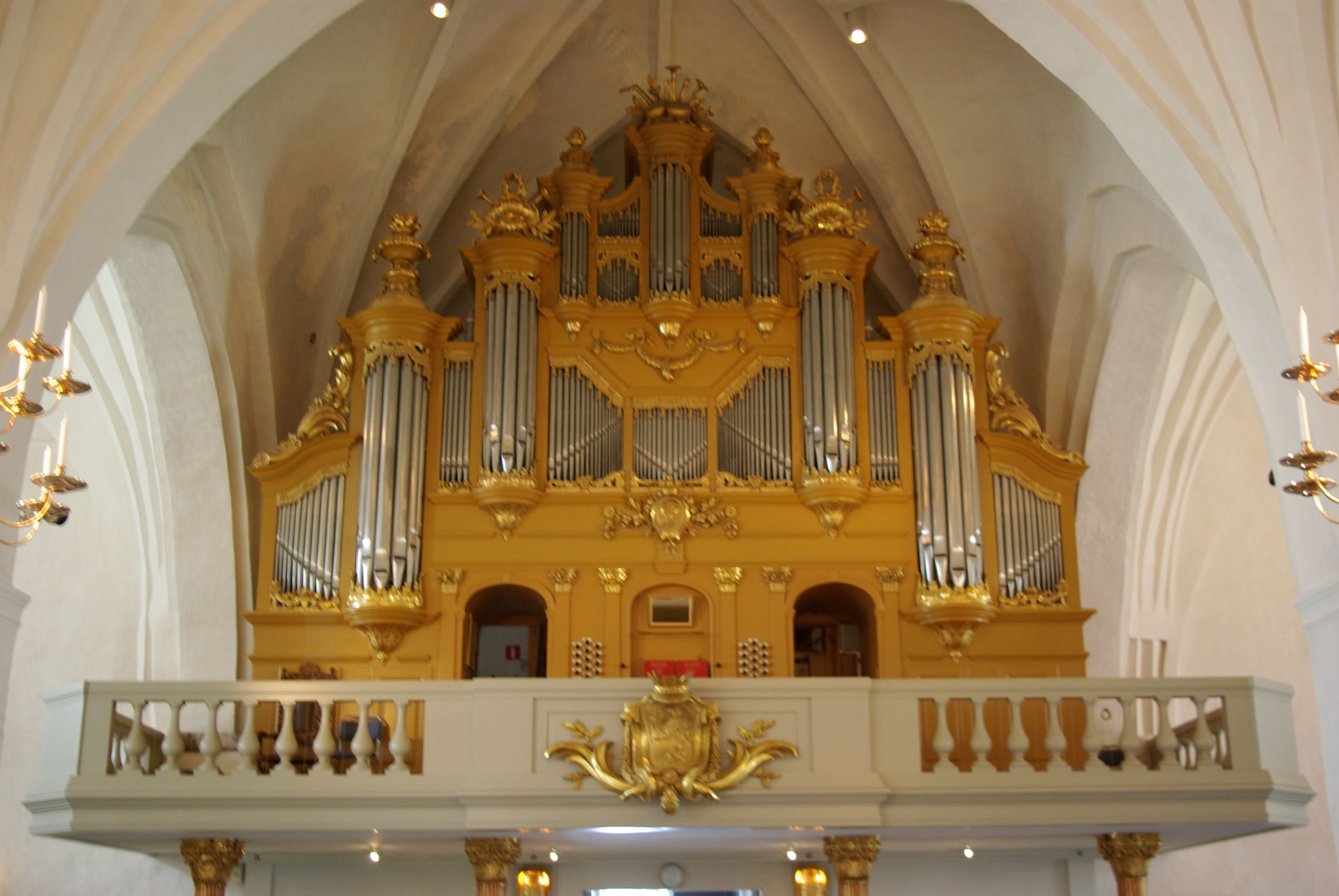 Växjö, Schweden, die Orgel auf der Empore. Die Orgel befindet sich auf der Empore über dem Haupteingang.